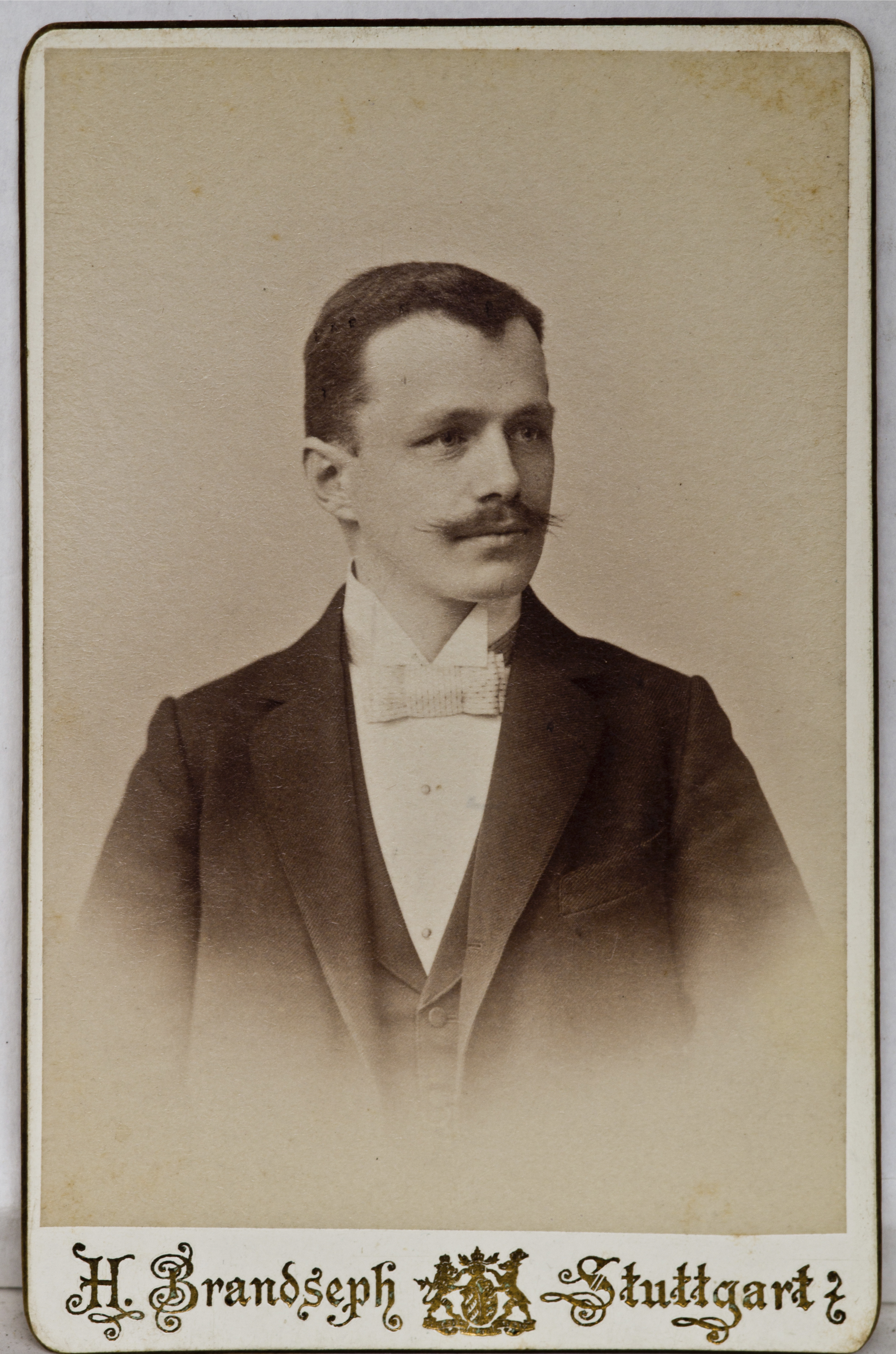 Porträtfoto von Albert Eitel im Alter von höchstens 41 Jahren, Fotograf: Hermann Brandseph, spätestens 1907